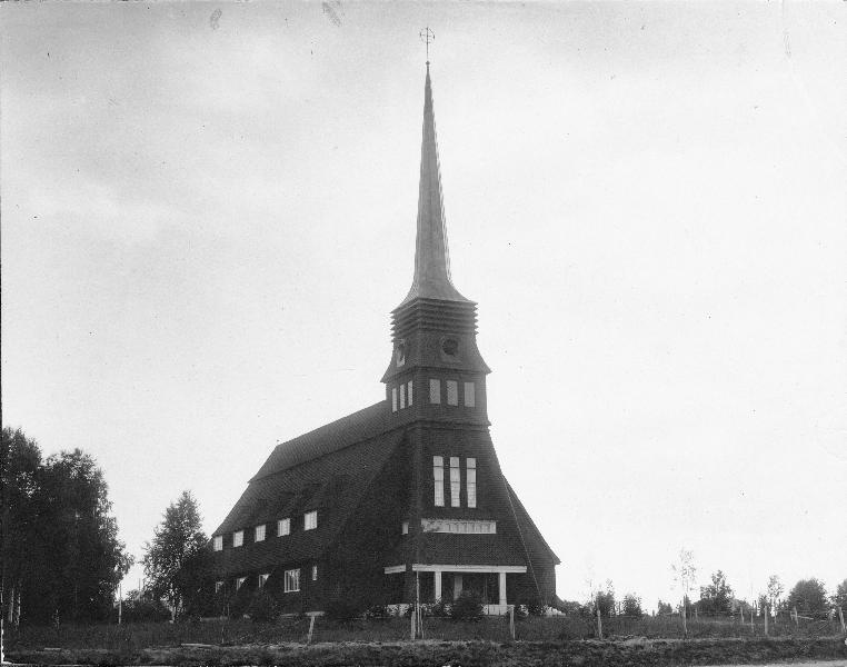 Kyrkan från nordöst. Kategori: (01) ExteriörerKyrkan från nordöst.